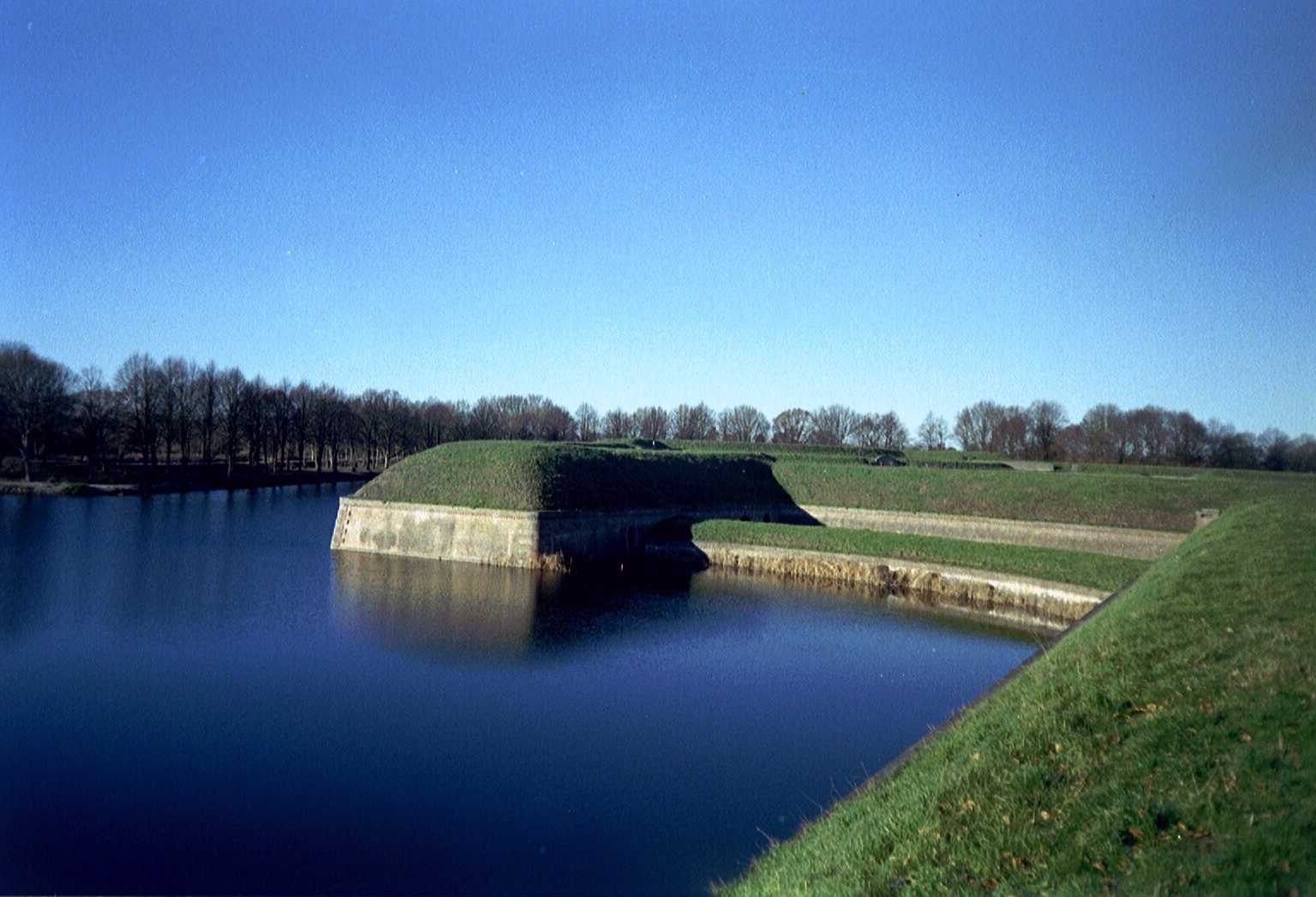 Gezicht op de wallen en binnenste gracht van Naarden-Vesting. Foto genomen in westelijke richting op 7 dec. 2003 en geüpload door maker.